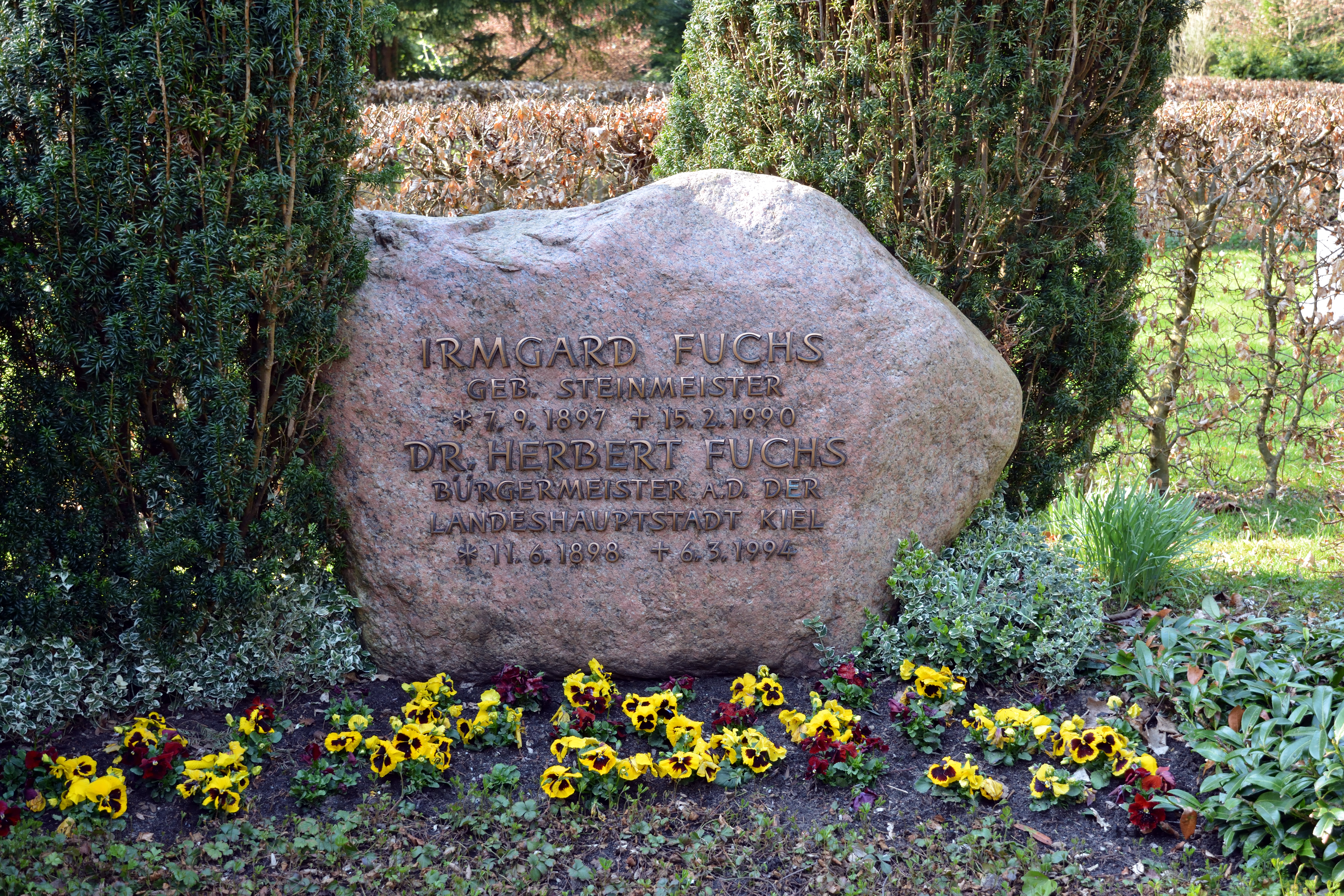 Impressionen vom Nordfriedhof in Kiel: Grab von Herbert Fuchs (Politiker)